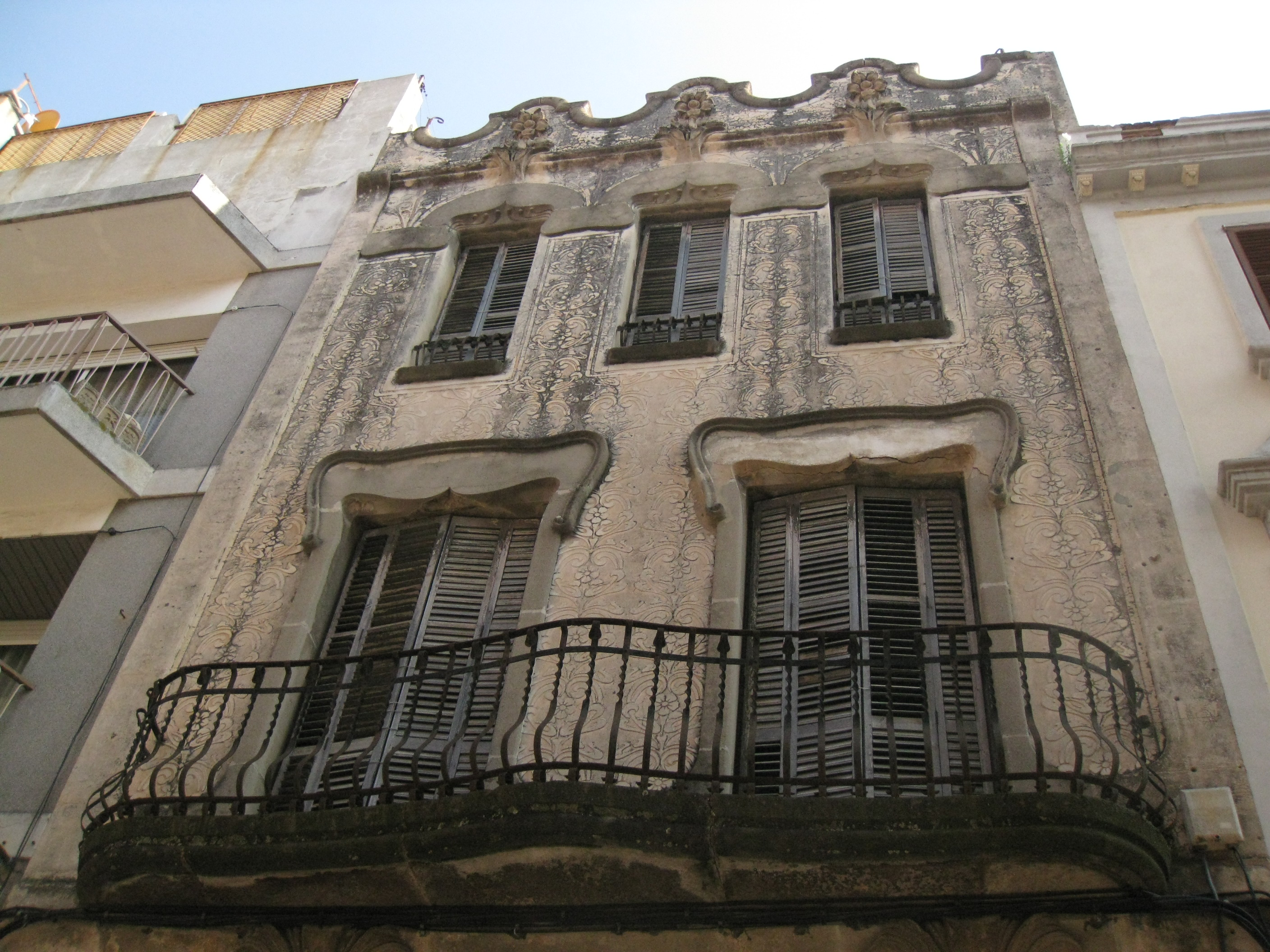 Façana al carrer Jovara, 166 (Calella)